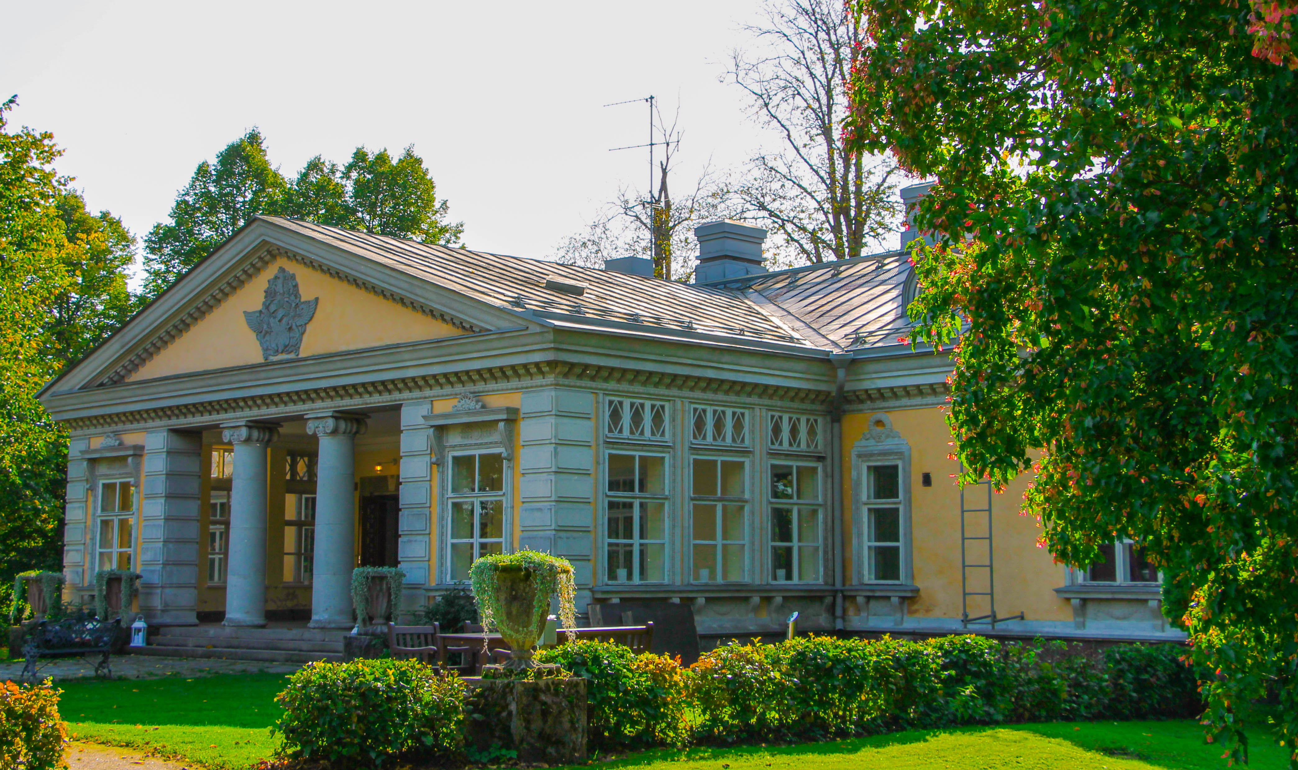 Espoon kartano